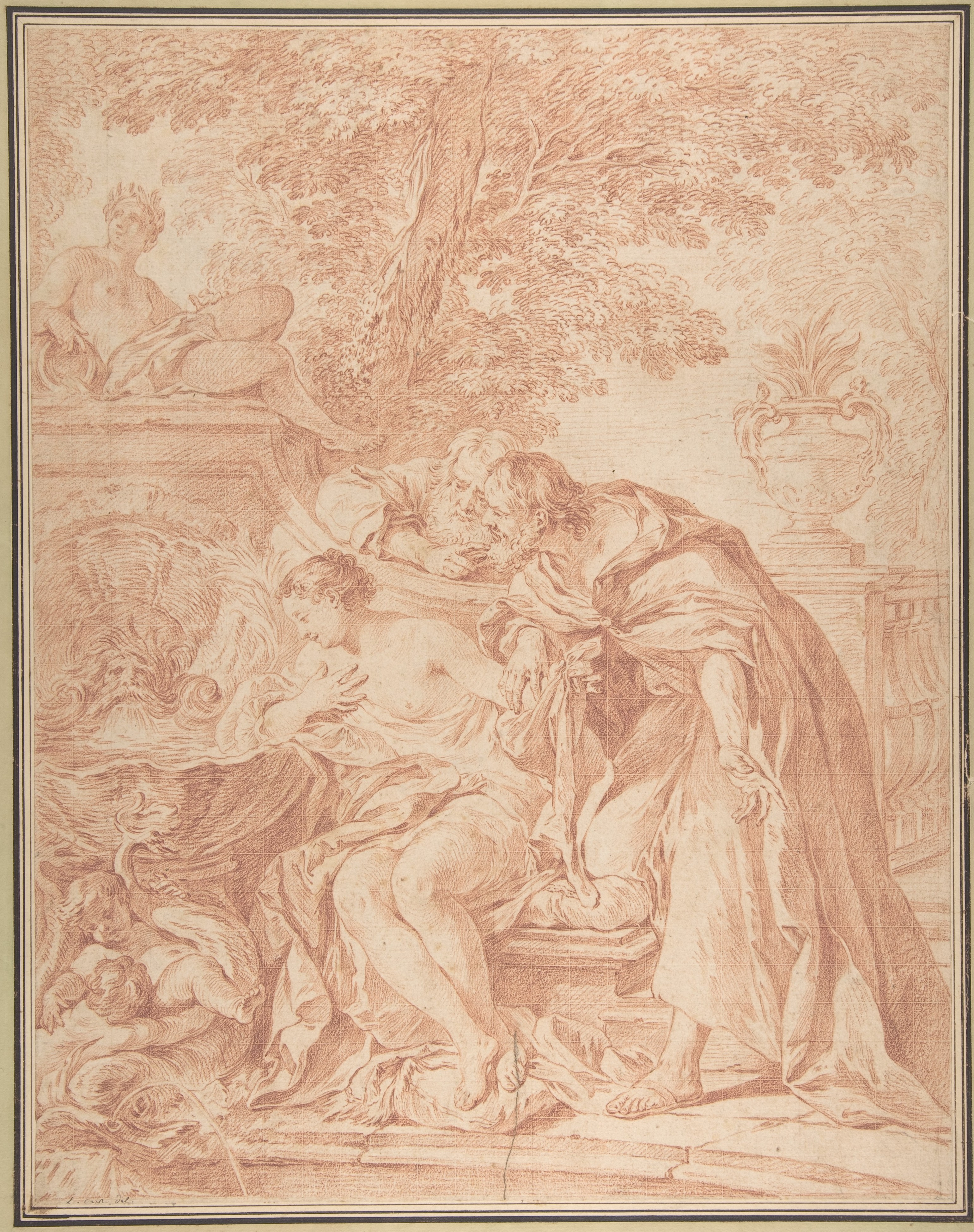 Drawing; Drawings